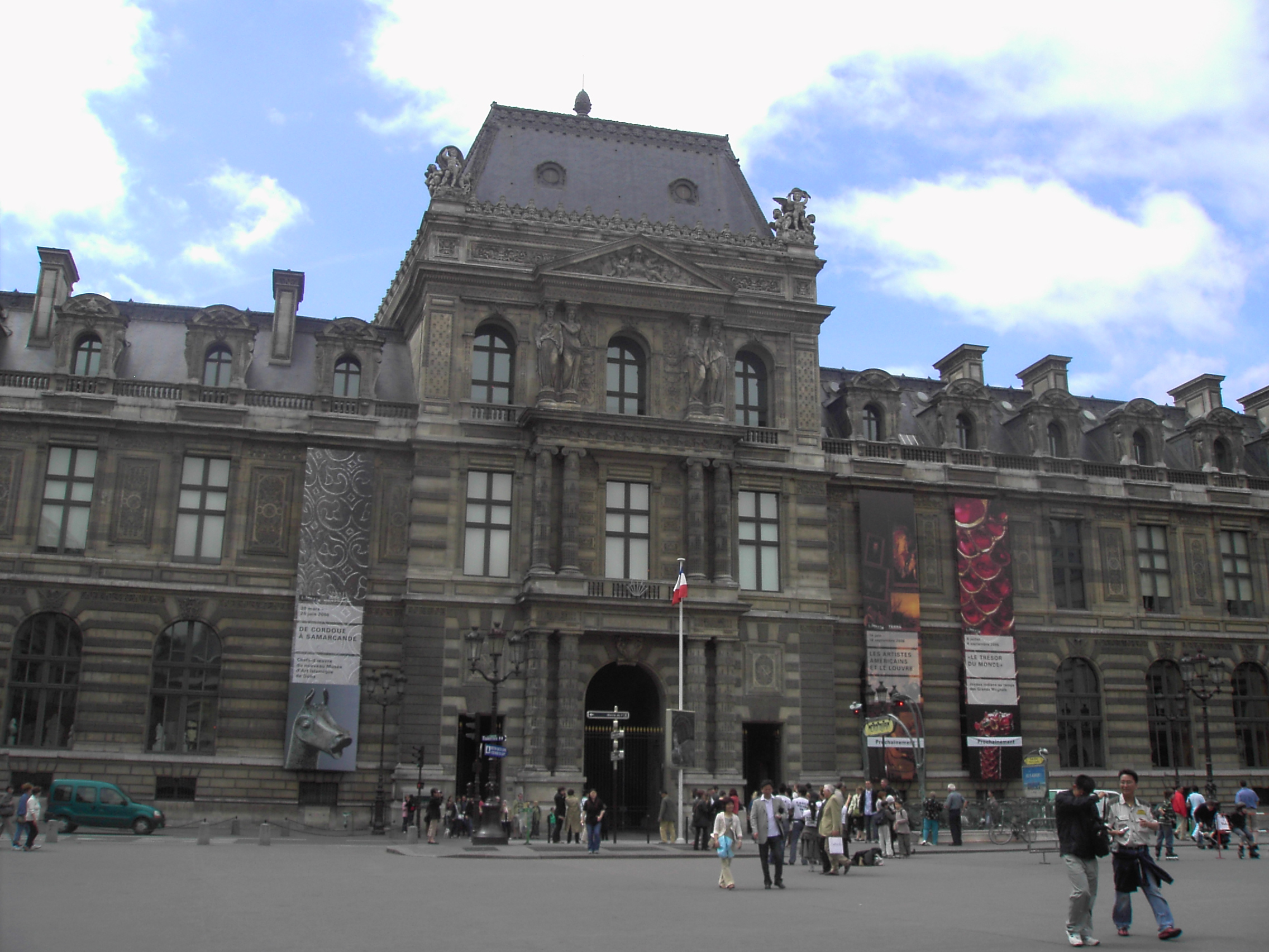 Pavillon de la Bibliothèque, façade nord du Palais du Louvre, Ier arrondissement, Paris, France.